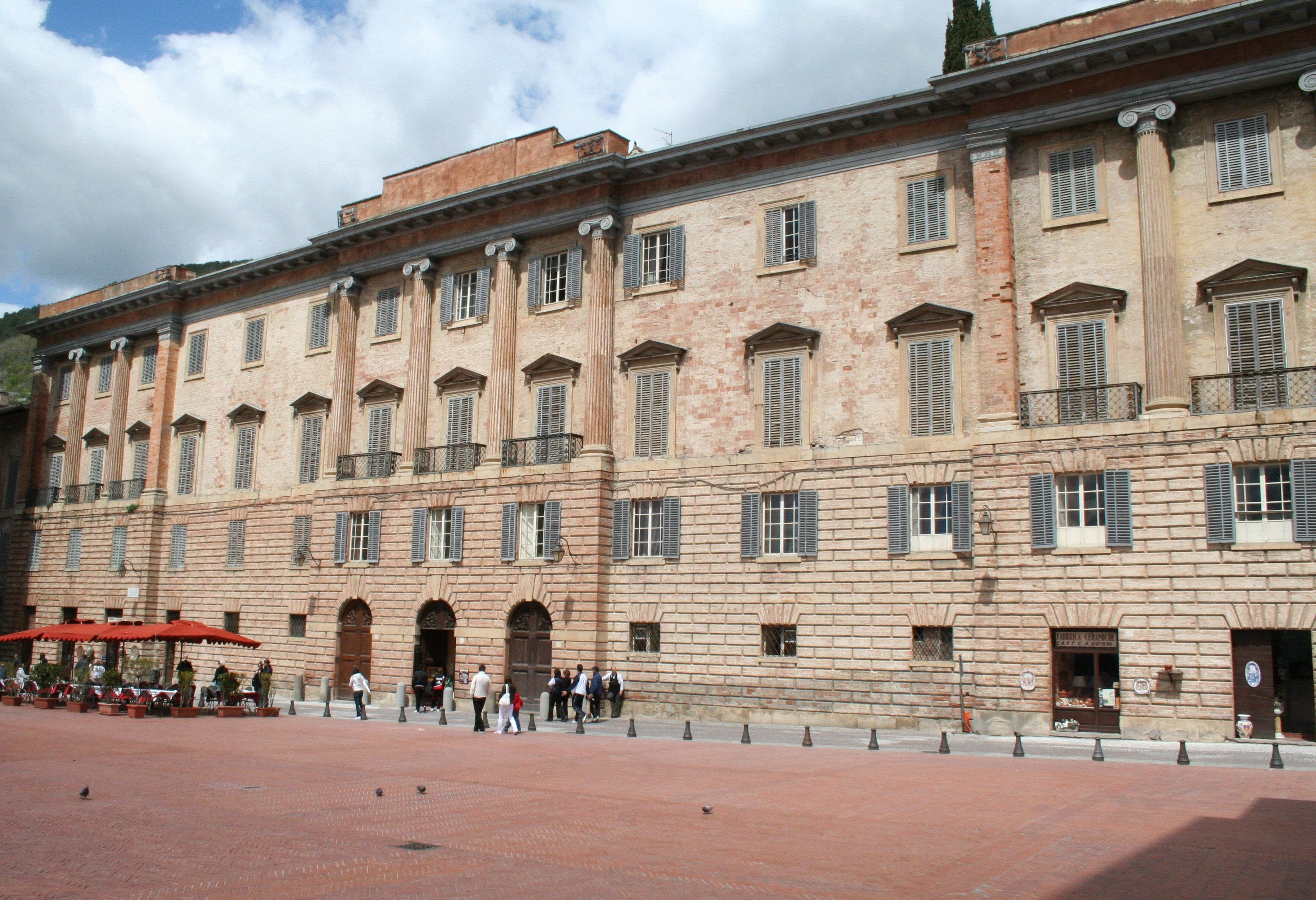 Piazza Grande in Gubbio